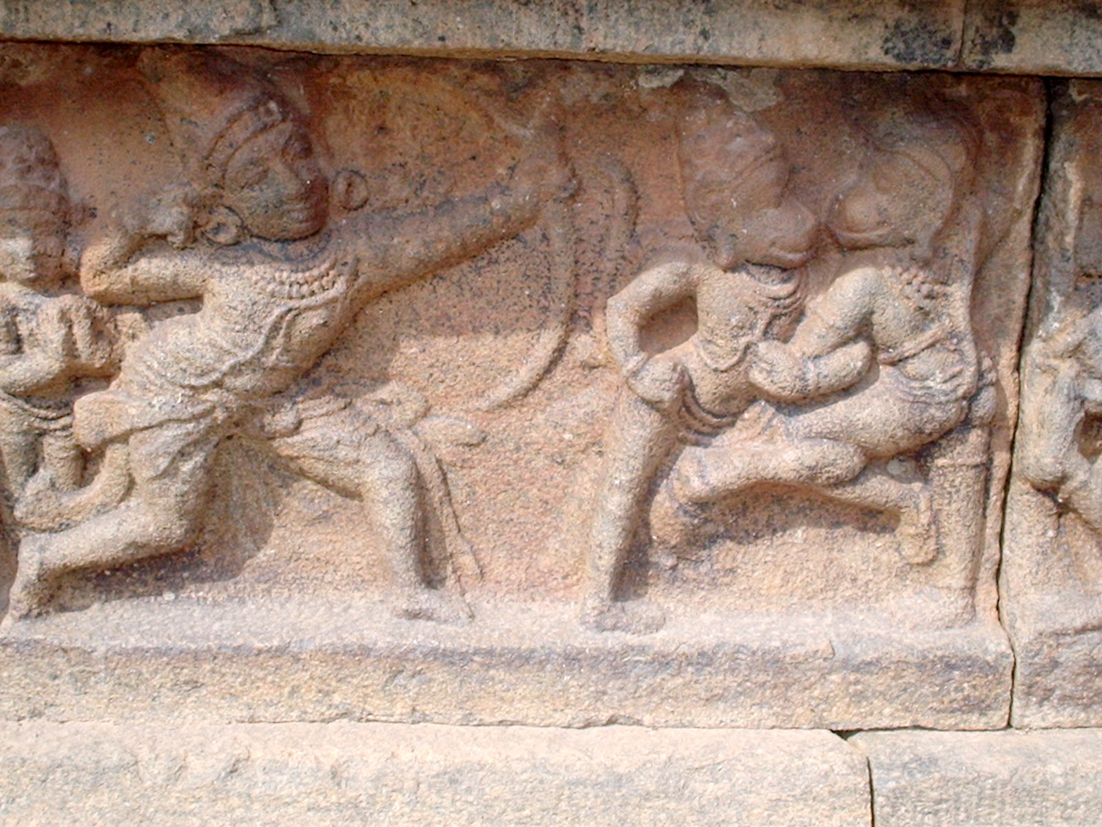 Ramayana scene - nicely depicted